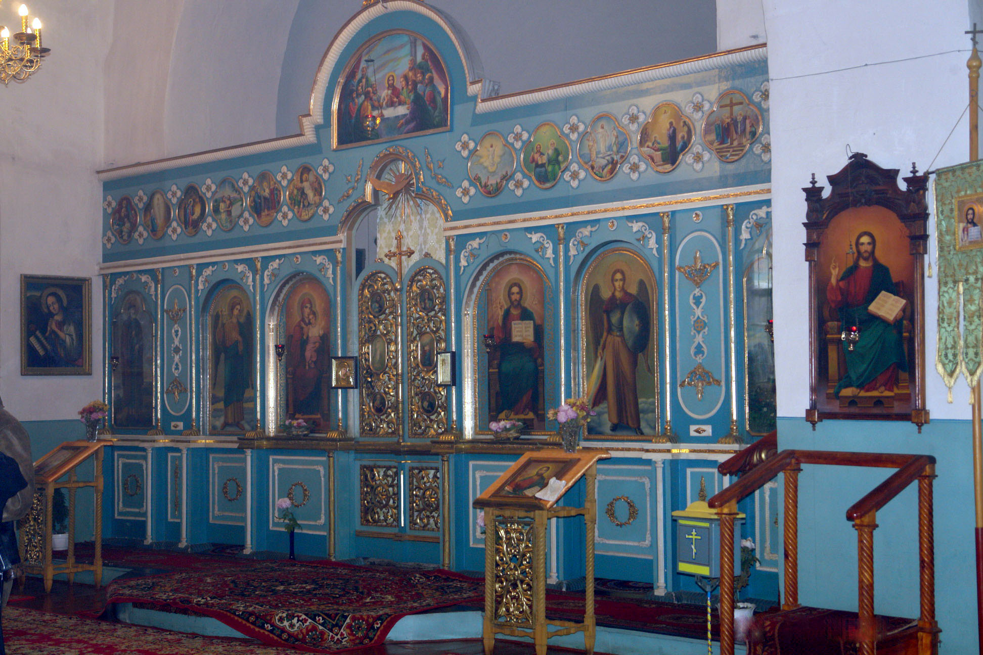 Уманська Свято-Троїцька церква: Свято-Троїцька церква